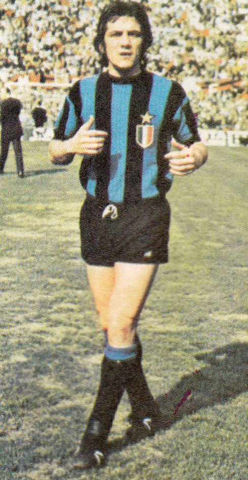 Il calciatore italiano Roberto Boninsegna all'Inter nella stagione 1971-72.